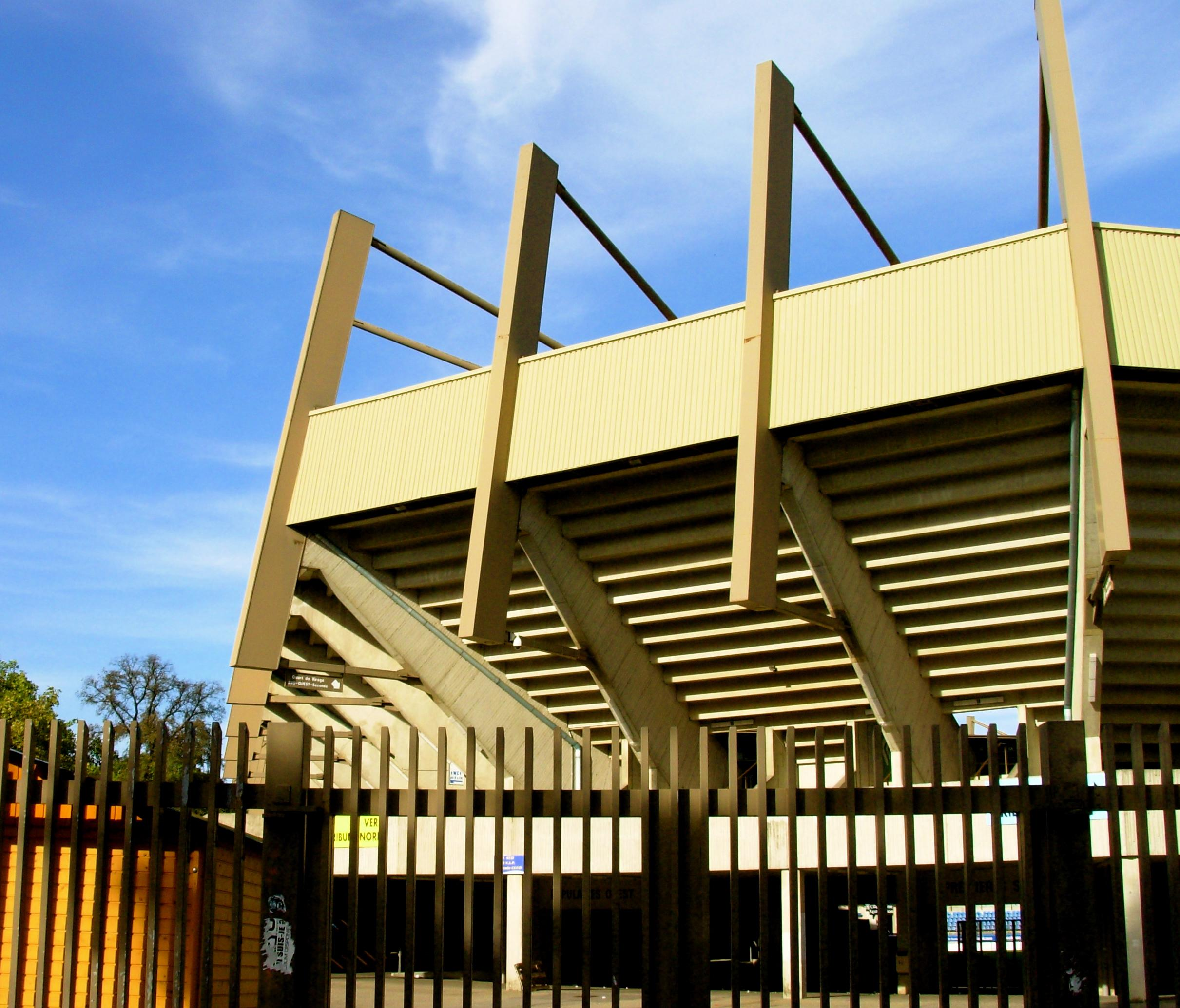 Stade de la Meinau, Strassbourg Fassade.